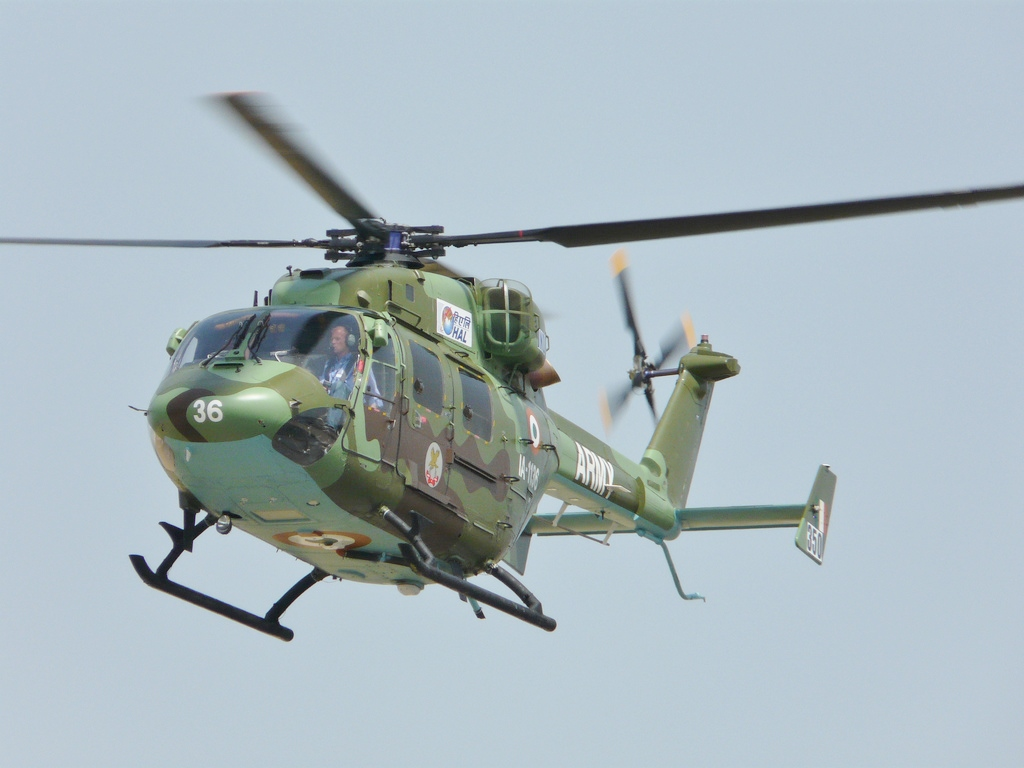 HAL Dhruv der indischen Armee